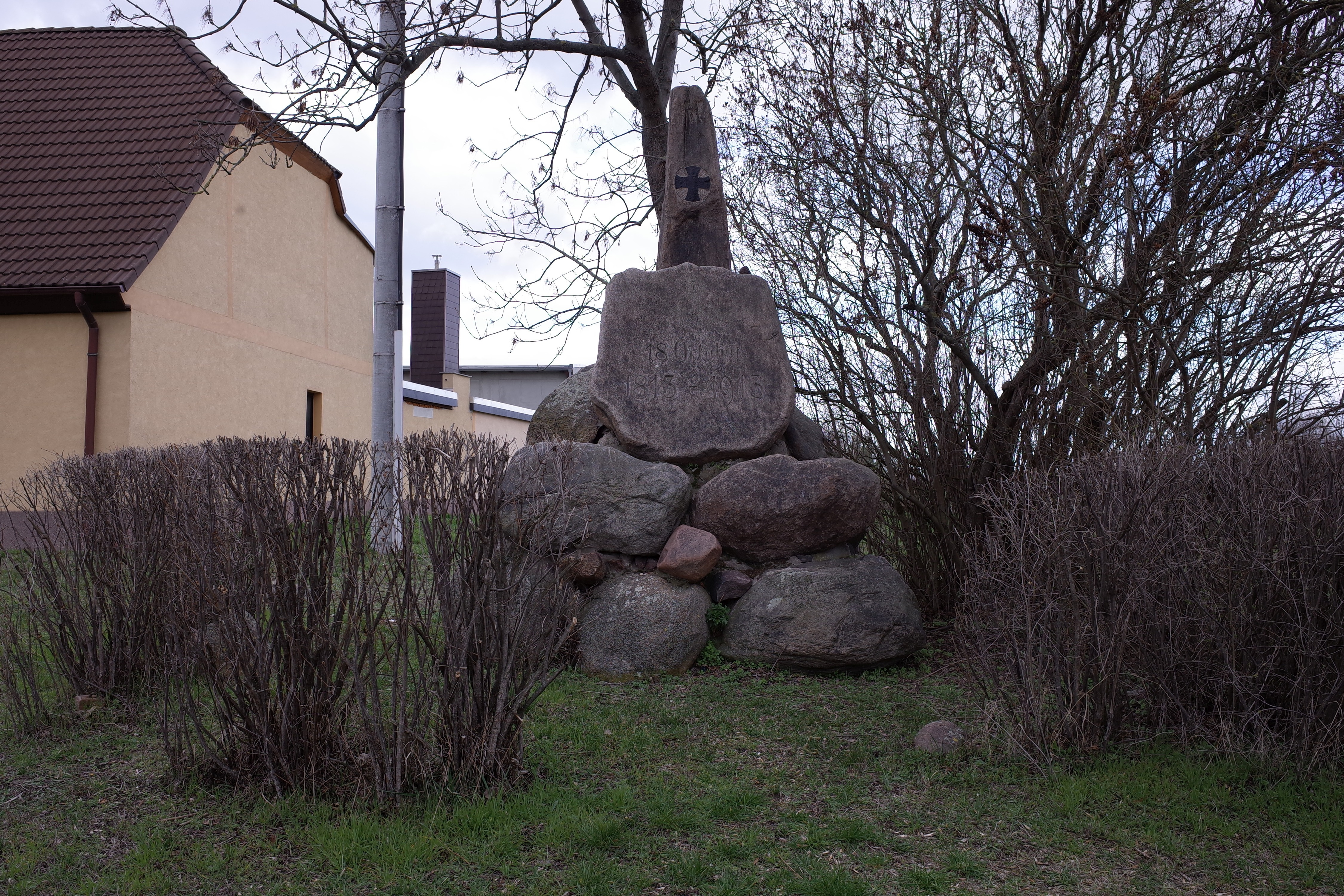 Stadt Südliches Anhalt, Ortsteil Cosa, Denkmal für die Befreiungskriege